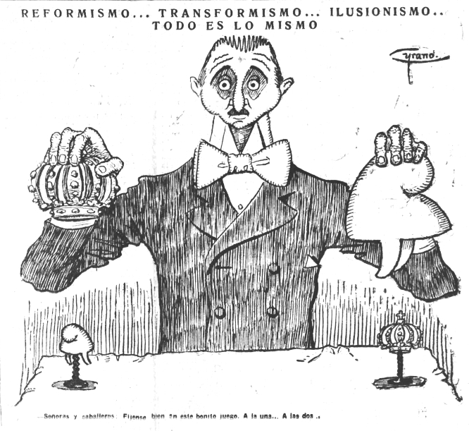 REFORMISMO... TRANSFORMISMO... ILUSIONISMO.. TODO ES LO MISMOSeñoras y caballeros: Fíjense bien en este bonito juego. A la una... A las dos...—Cyrano